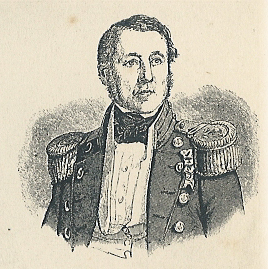 Kaptajn Steen Andersen Bille. 1797-1883.